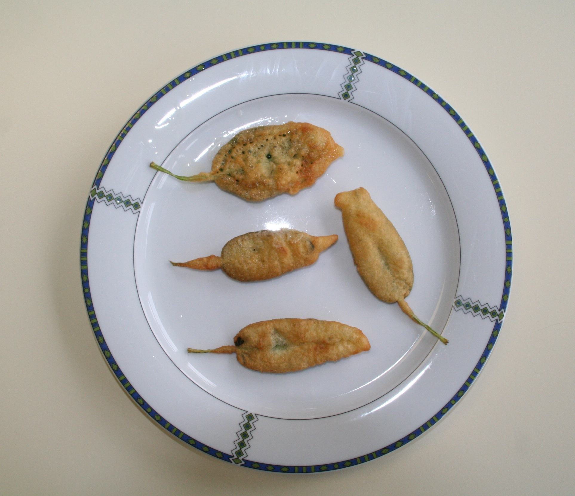 Salbeiküchlein